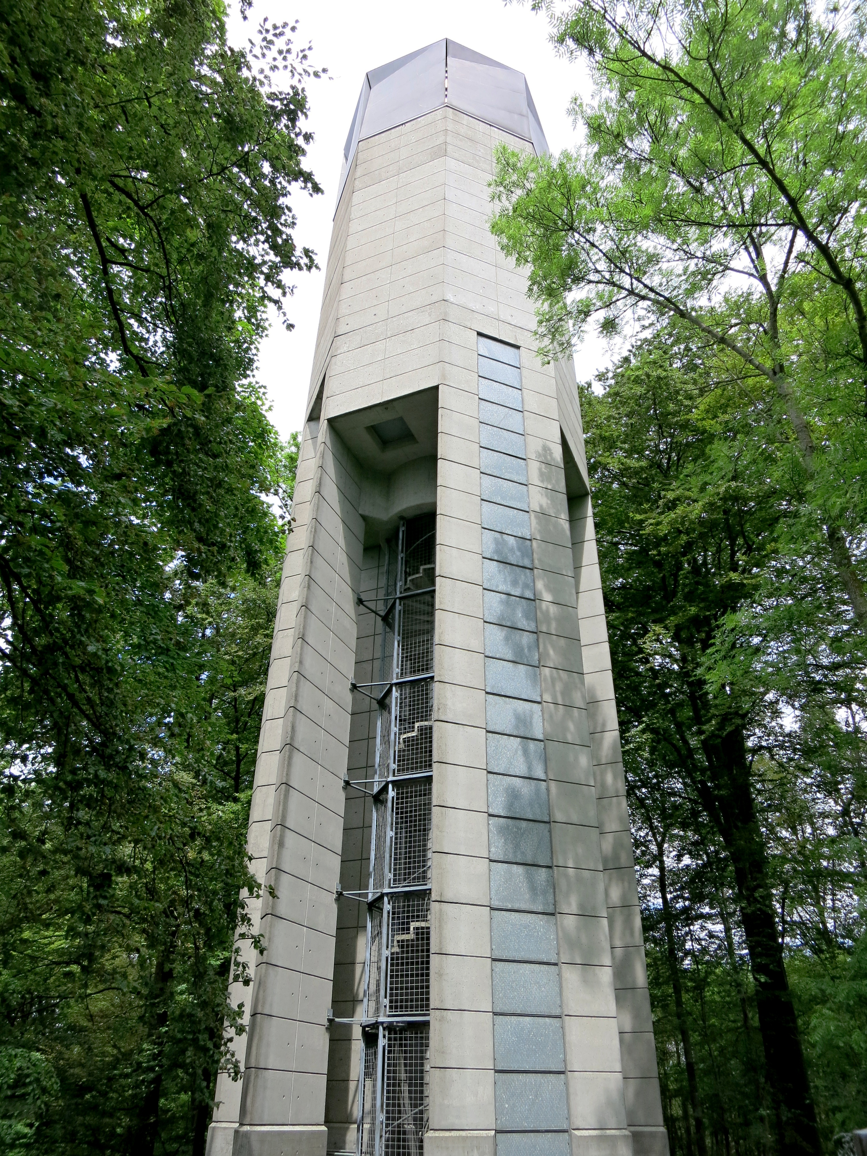 Baldegger Wasserturm